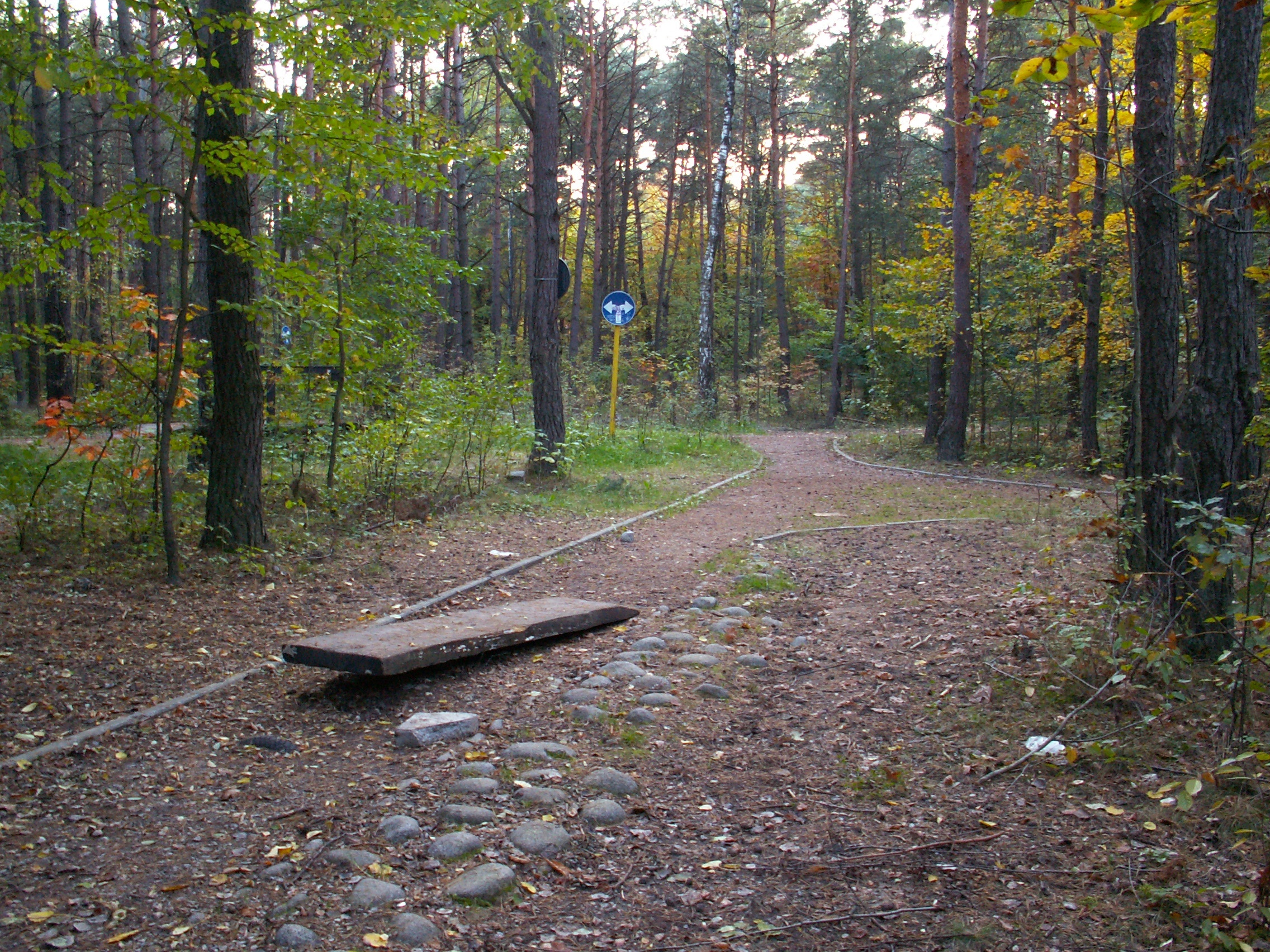 Stadion Leśny w Kielcach